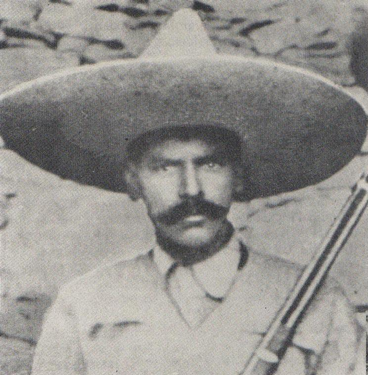 General José Hernández